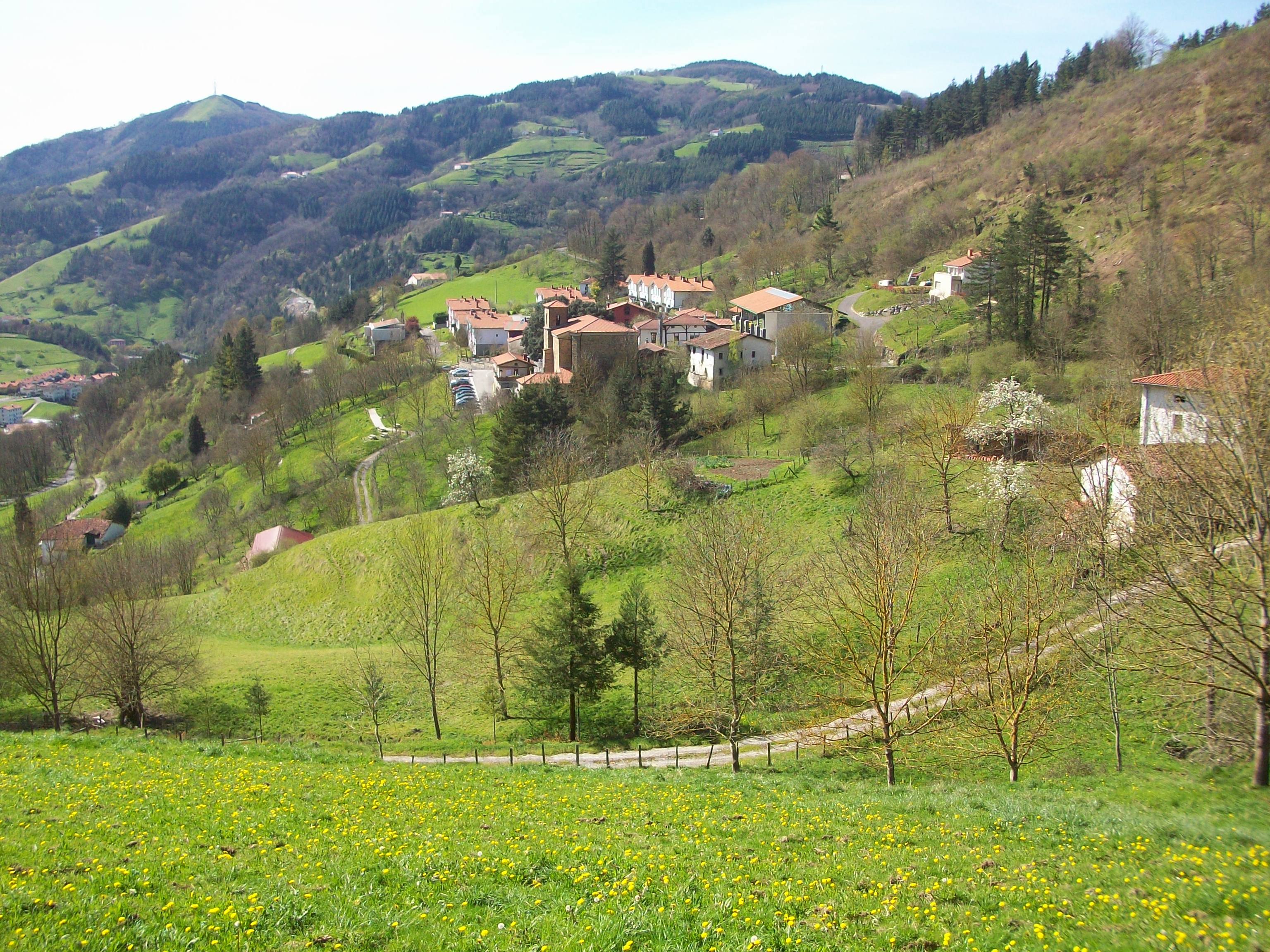 Altzaga, Goierri. Gipuzkoa, Euskal Herria. Altzaga, Goierri. Guipuscoa, Basque Country.